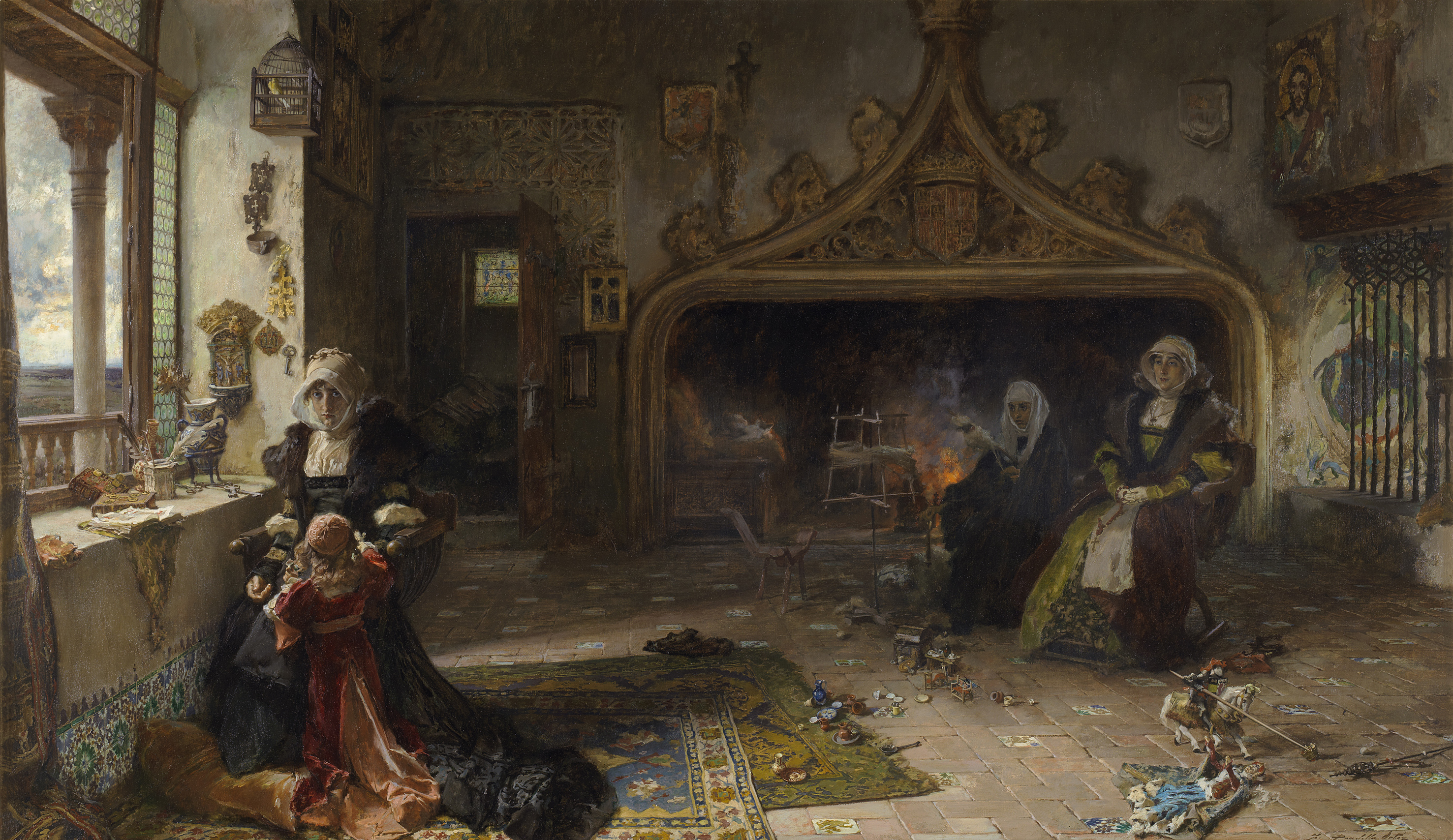 Esta obra representa a la reina Juana I de Castilla (1479-1555) encerrada en Tordesillas, donde permaneció varias décadas, y junto a ella aparece su hija, la infanta Catalina de Austria (1507-1578), que llegaría a ser reina consorte de Portugal por su matrimonio con el rey Juan III. Esta obra fue adquirida por el Museo del Prado en 1990.